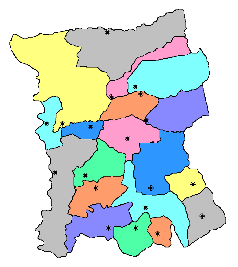 División político administrativa del departamento de San Pedro en Paraguay.